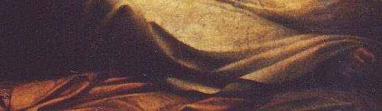 Gheorghe Tattarescu - Renasterea Romaniei (detaliu 3)